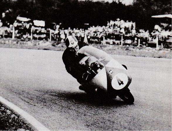 Il pilota motociclistico italiano Libero Liberati in azione su Gilera nel 1957.